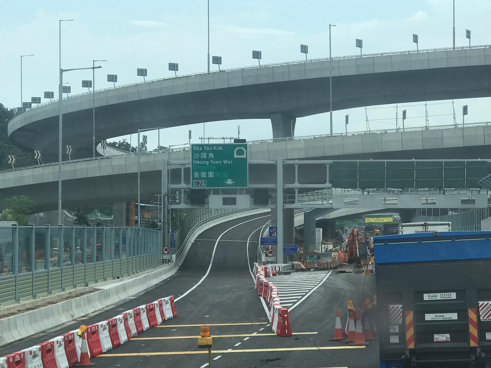 香園圍公路九龍坑入口